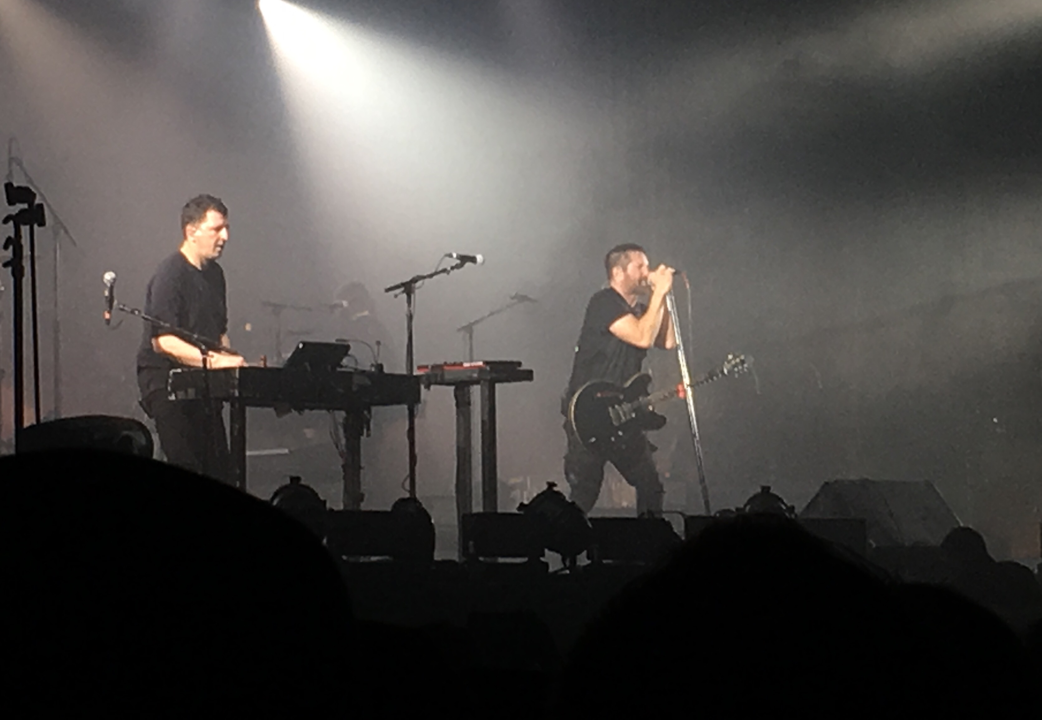 NIN @ Aragon, Chicago 10/25/2018